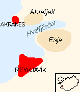 Schéma des positions de Reykjavík et d'Esja